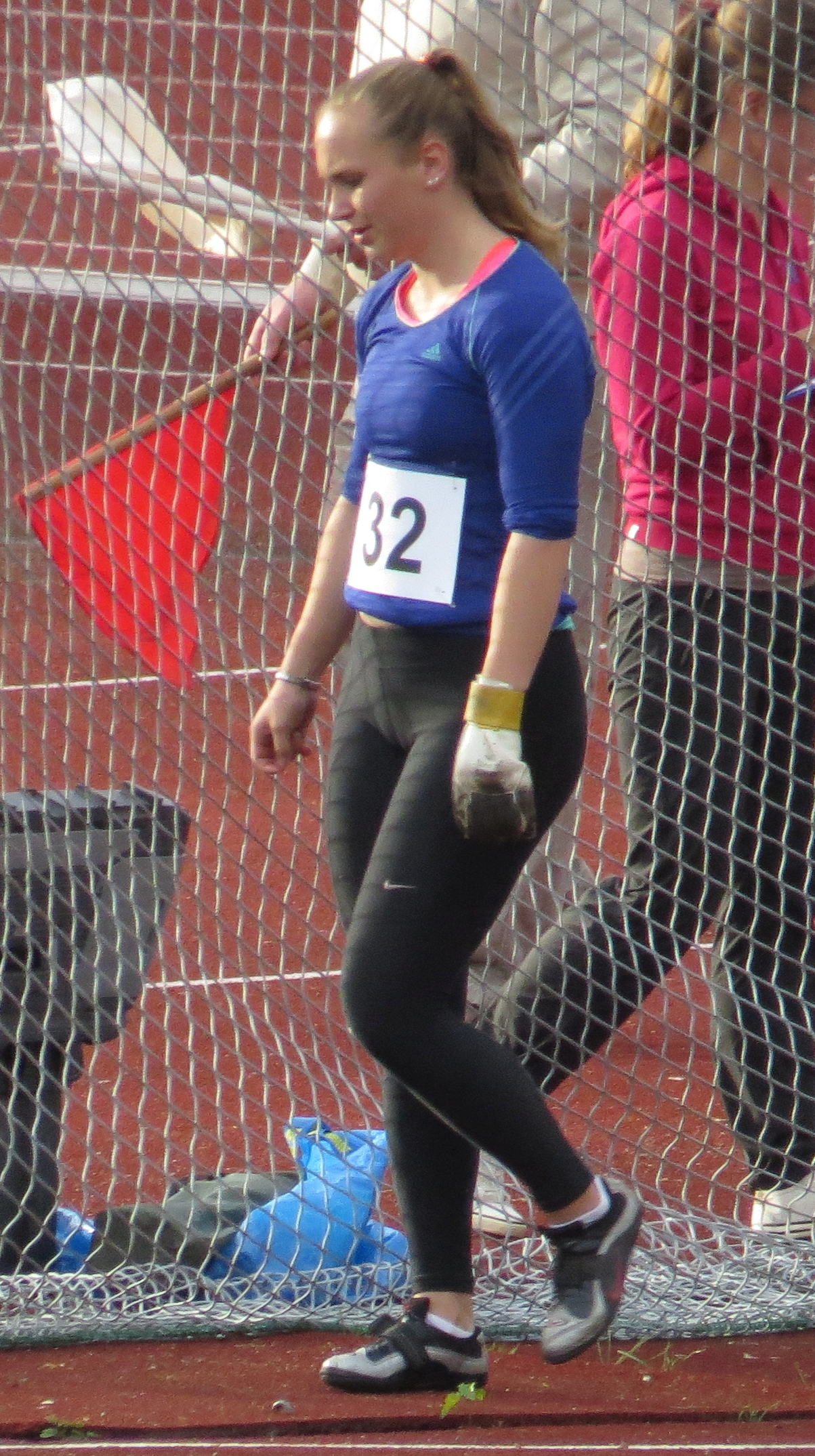 Inga Linna, suomalainen moukarinheittäjä Karhulan keskuskentällä vuonna 2015.